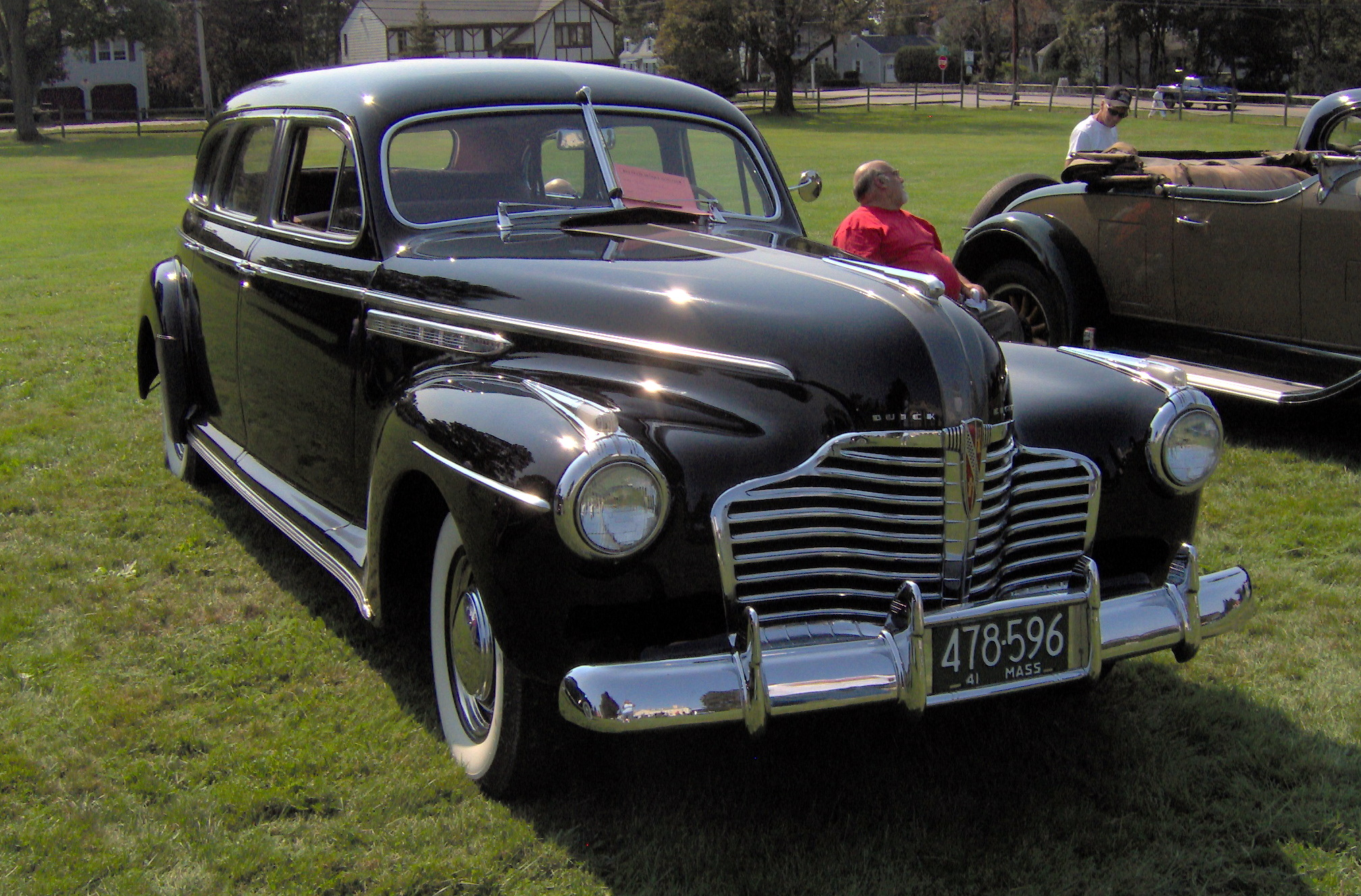 1941 Buick Series 70 Model 71 Touring Sedan